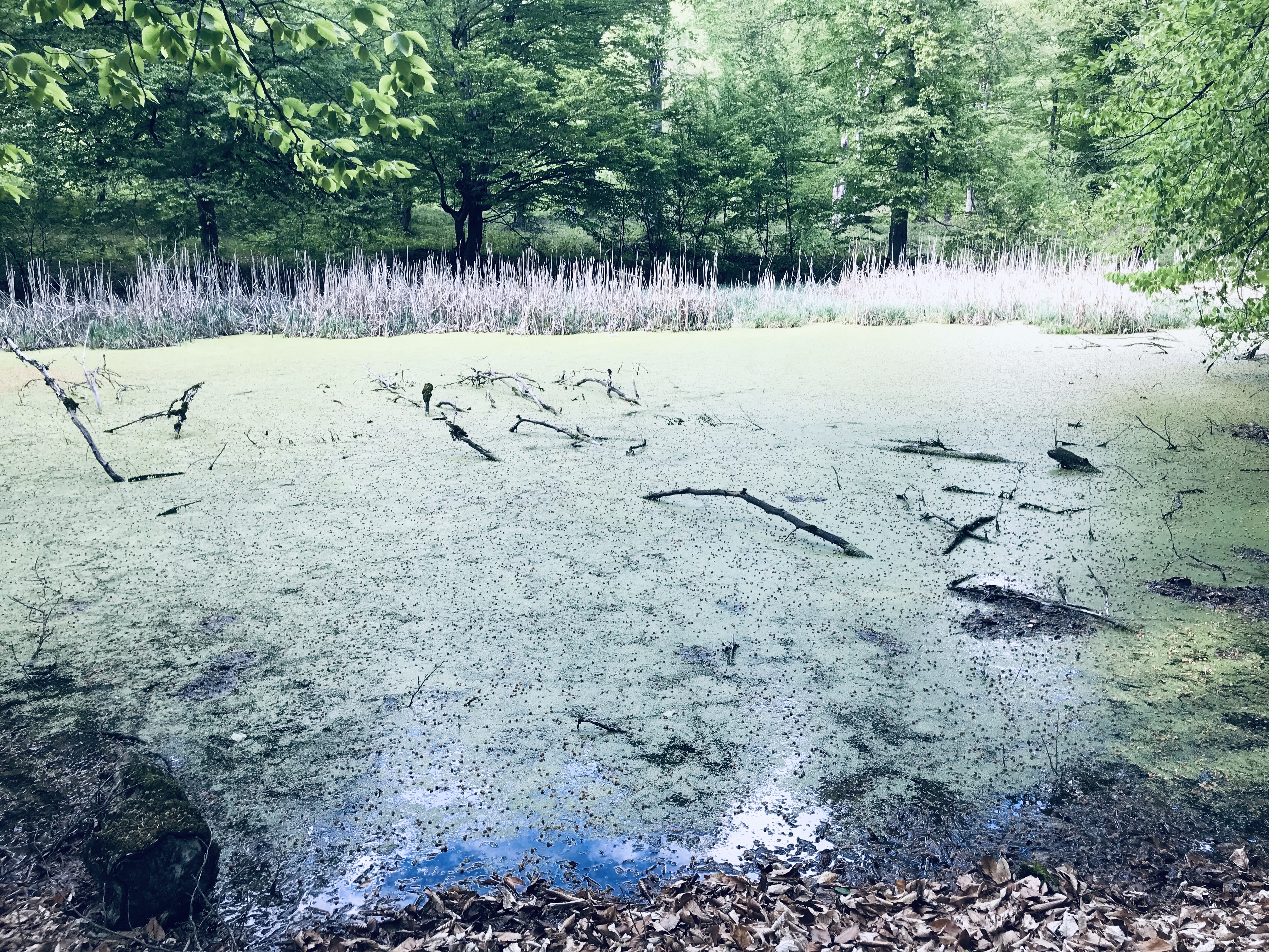 Դիլիջան ազգային պարկ